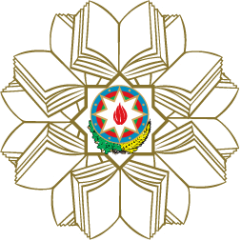 Azərbaycan Respublikası Təhsil Nazirliyinin loqosu